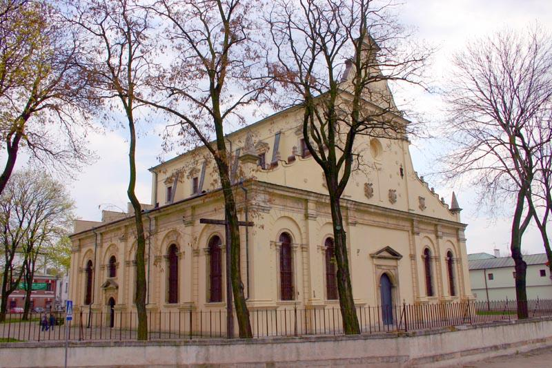 Zamosc (Poland)